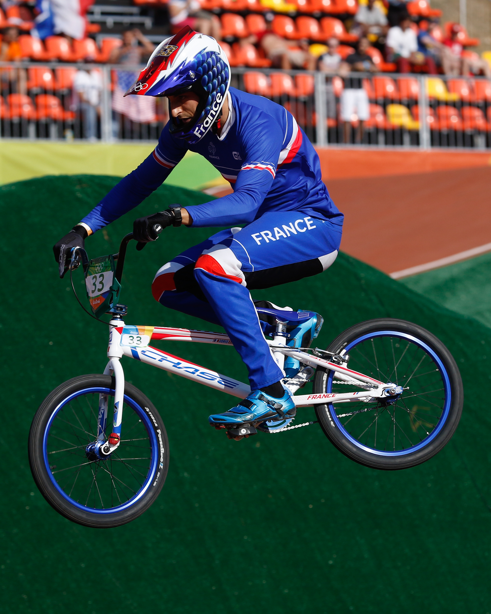 Rio de Janeiro - Ciclista francês Joris Daudet compete BMX nos Jogos Olímpicos Rio 2016, no Parque Radical em Deodoro ( Fernando Frazão/Agência Brasil)